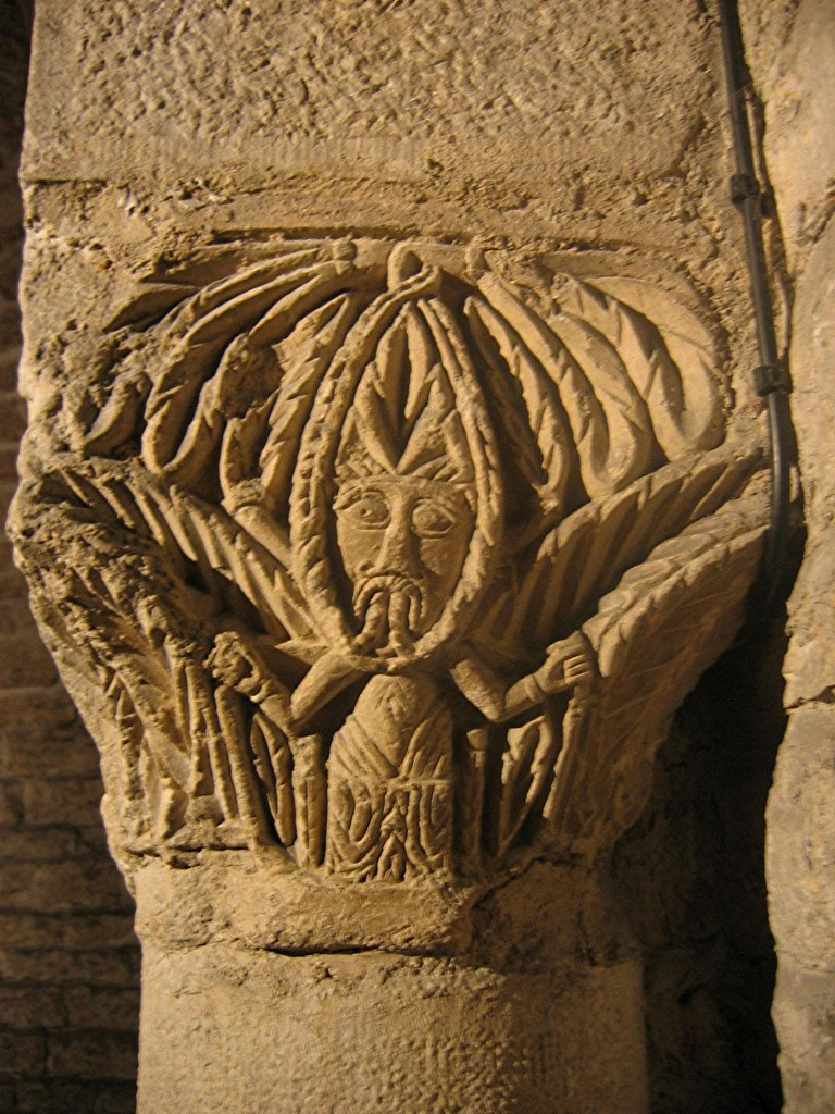 Crypte de la cathédrale de Dijon, Bourgogne, France.